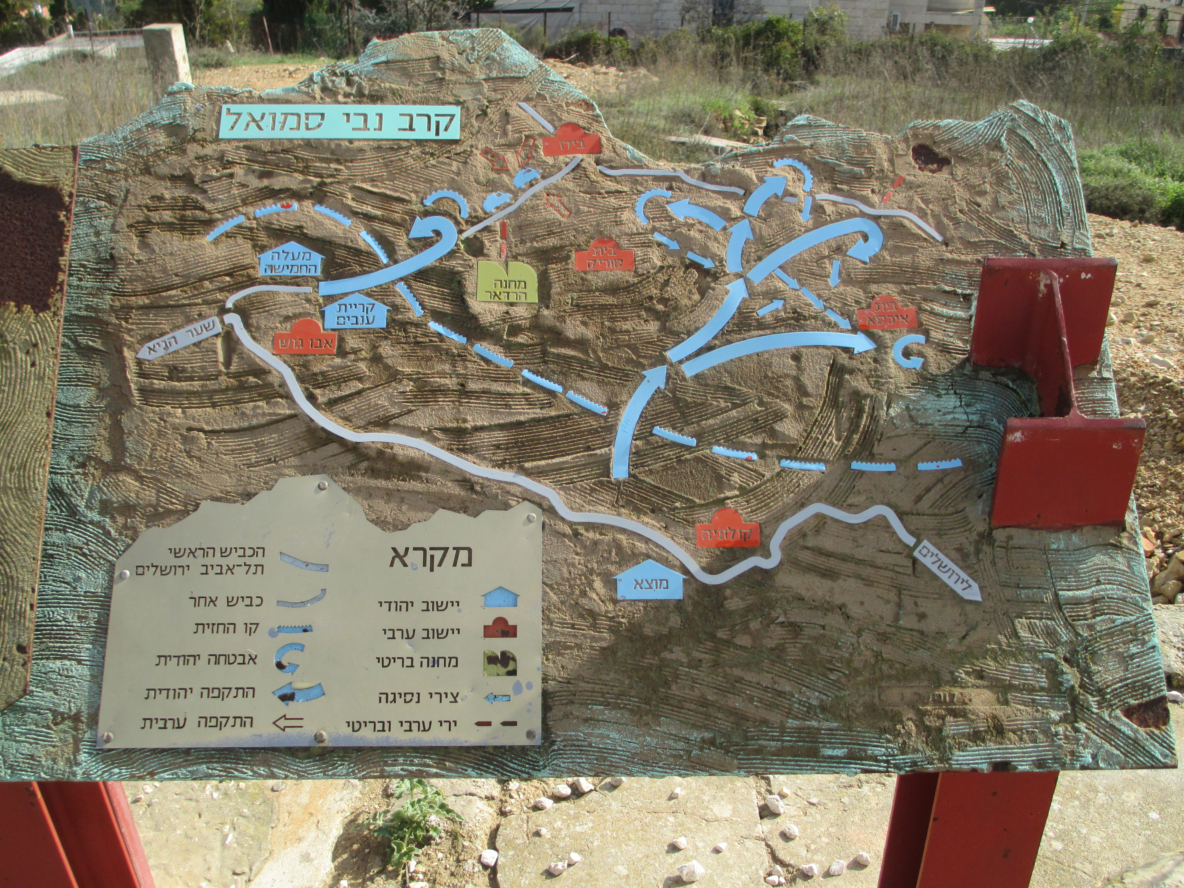 מפת קרב נבי סמואל - באתר גבעת הרדאר